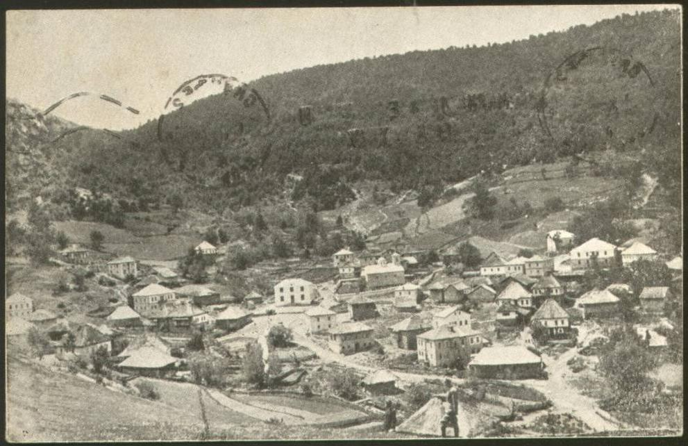 Село Никифорово